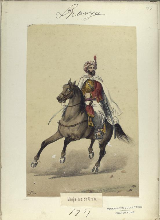 Mogataz d'Oran. 1737